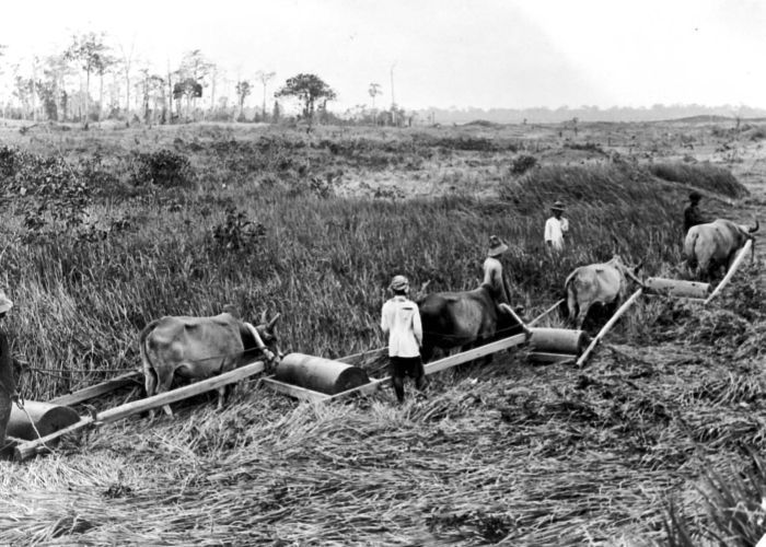 Repronegatief. Op de grote Westerse landbouwondernemingen lag altijd wel een stuk grond braak. Als die grond dan niet opzettelijk een paar keer in brand gevlogen was, keerde daar doorgaans geen bos terug, maar werd de grond bedekt met lange taaie grassen. De bekendste soort werd op Java alang-alang genoemd en op Sumatra lalang. Het was een groot probleem voor de plantages, omdat ze deze 'groene' woestijn nauwelijks de baas konden. Op de foto zien we een poging om de alang-alang onder de duim te houden door het plat te walsen. Het duurde even voor men erachter kwam dat schaduw de ergste vijand van dit gewas was. (P. Boomgaard, 2001). Boeren te Tanah Gamboes, Sumatra, rollen het gras met behulp van ossen en rollers